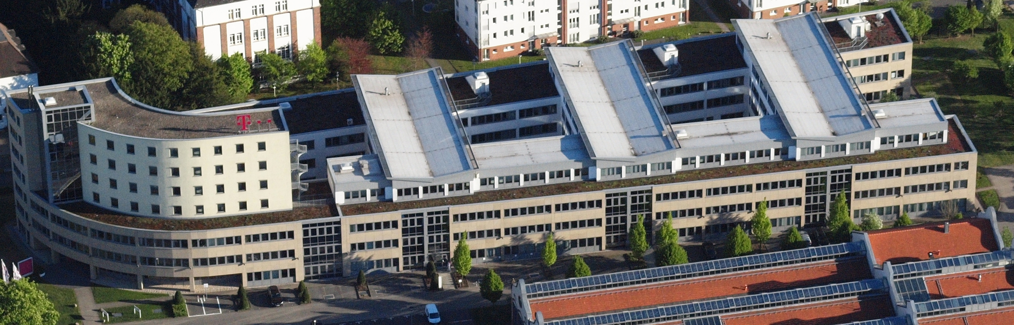 Sitz der Telekom-Stiftung, Graurheindorfer Straße 153, Bonn-Castell: Luftaufnahme